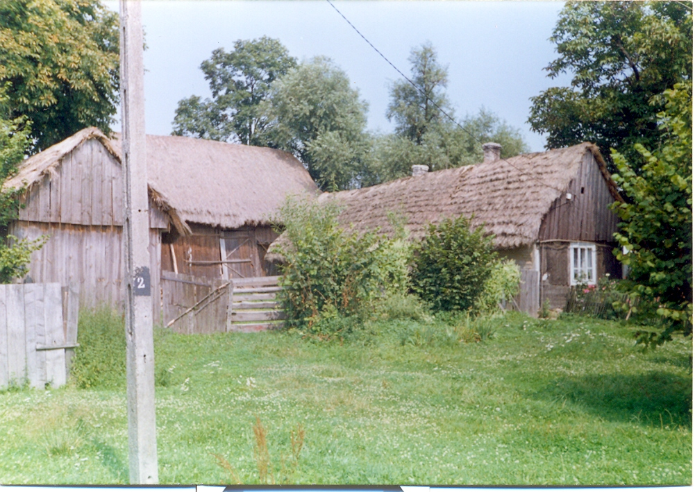 Zabytkowa zagroda w Gęsicach (gmina Łagów)